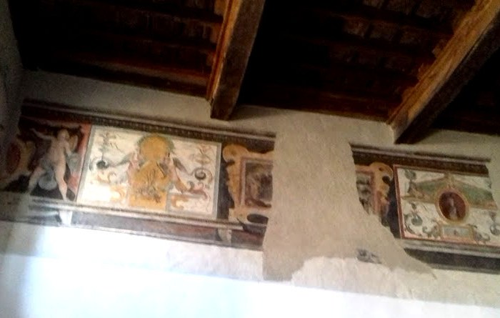 Fregio Affrescato